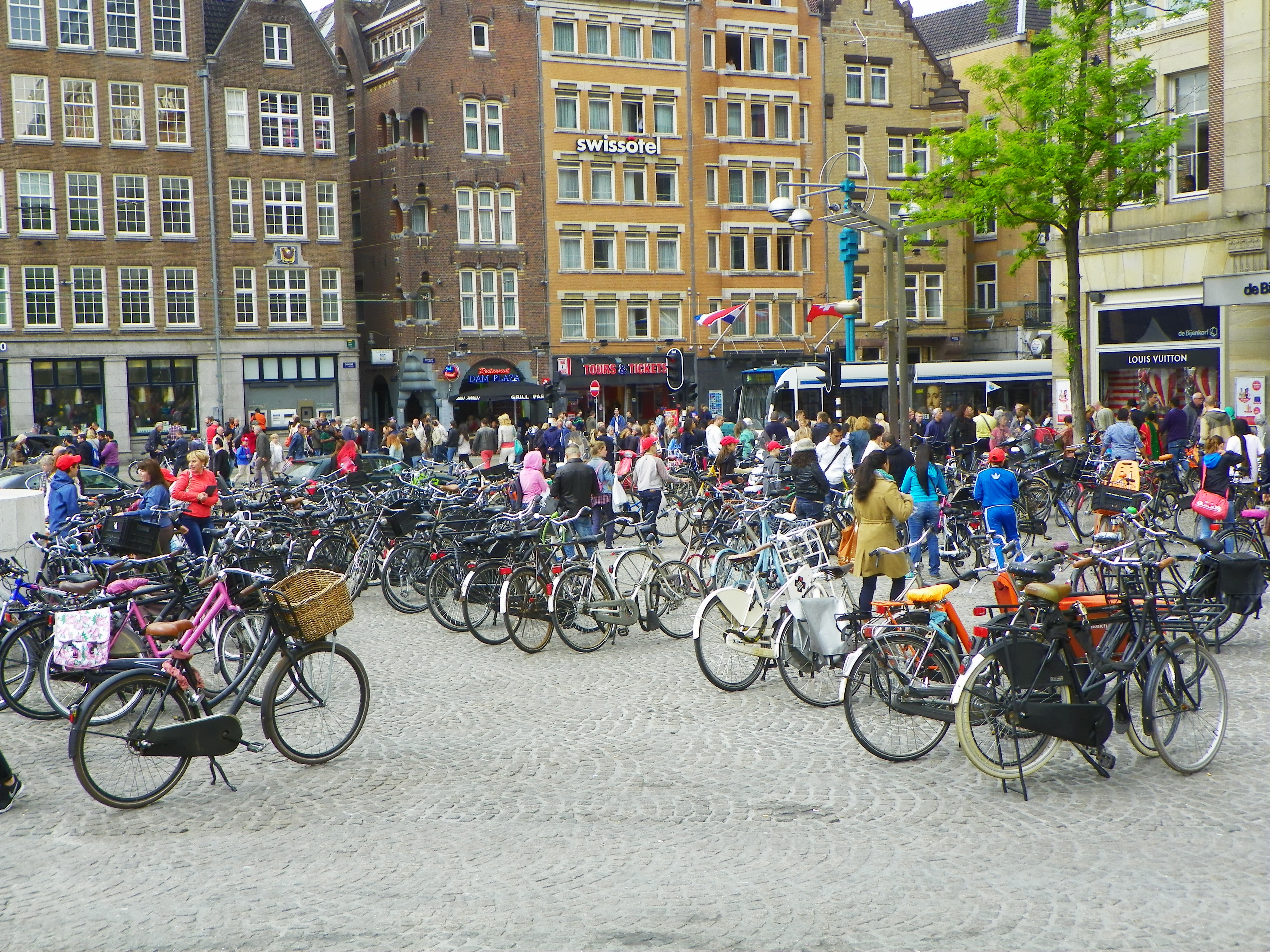 Amsterdam, Holanda